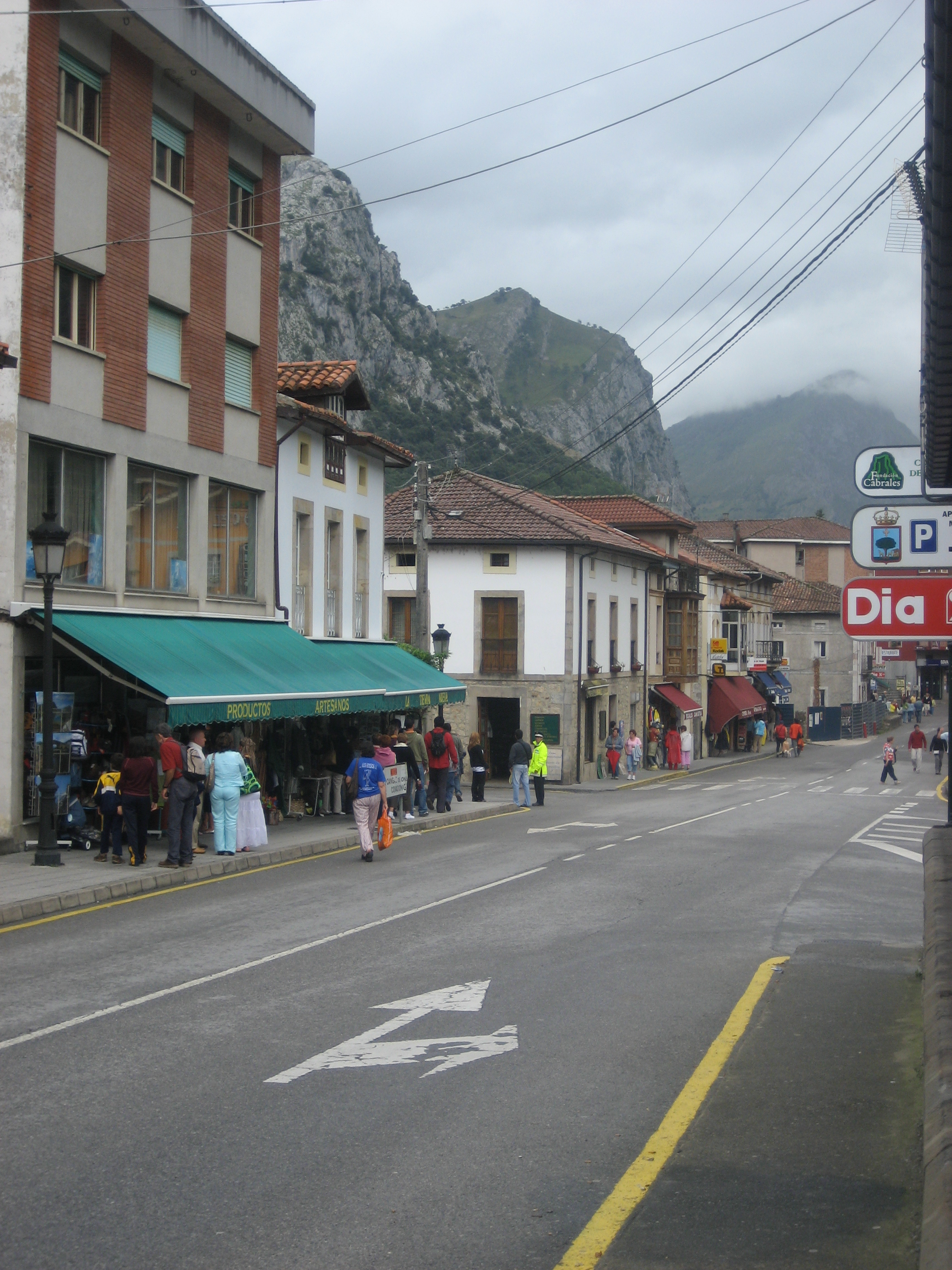 Las Arenas de Cabrales